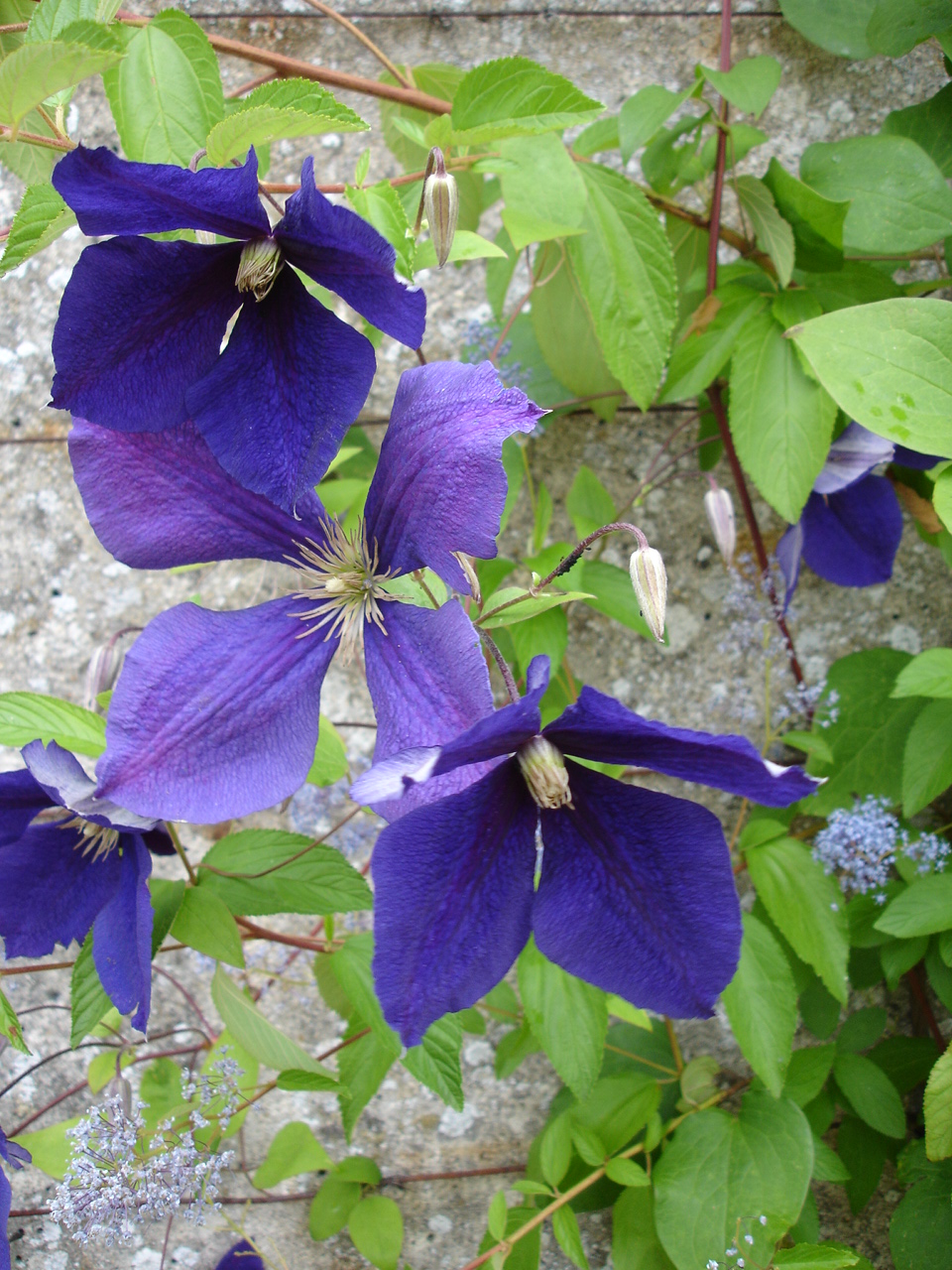 Clematis 'Jackmannii'